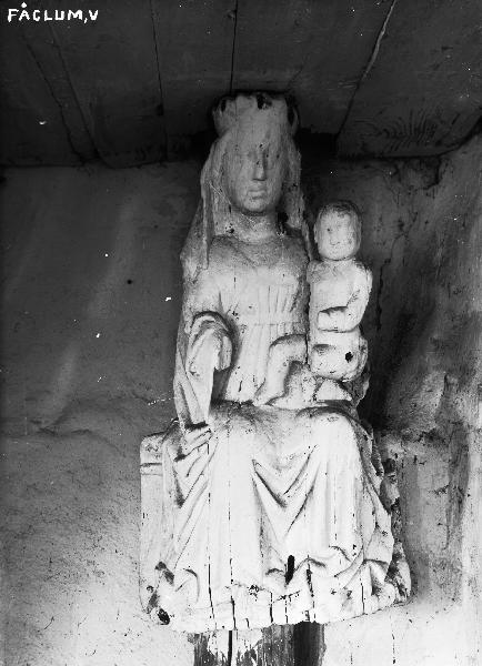 Träskulptur, Madonna (ur altarskåp?). Snabbinv. Kategori: (05) SkulpturerTräskulptur, Madonna (ur altarskåp?). Snabbinv.